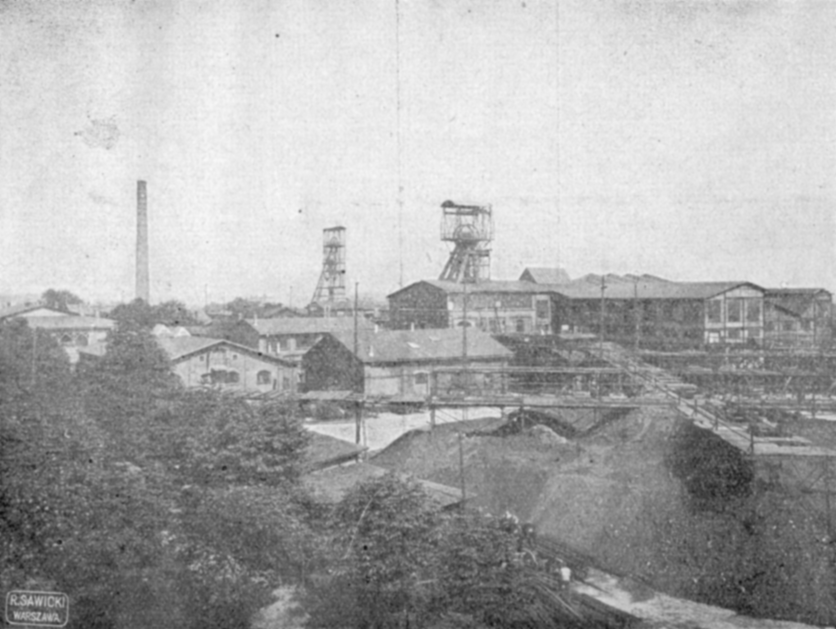 Wieże wyciągowe szybów św. Barbary (I i II, dawne Bahnschachts) kopalni węgla kamiennego Król w Chorzowie.